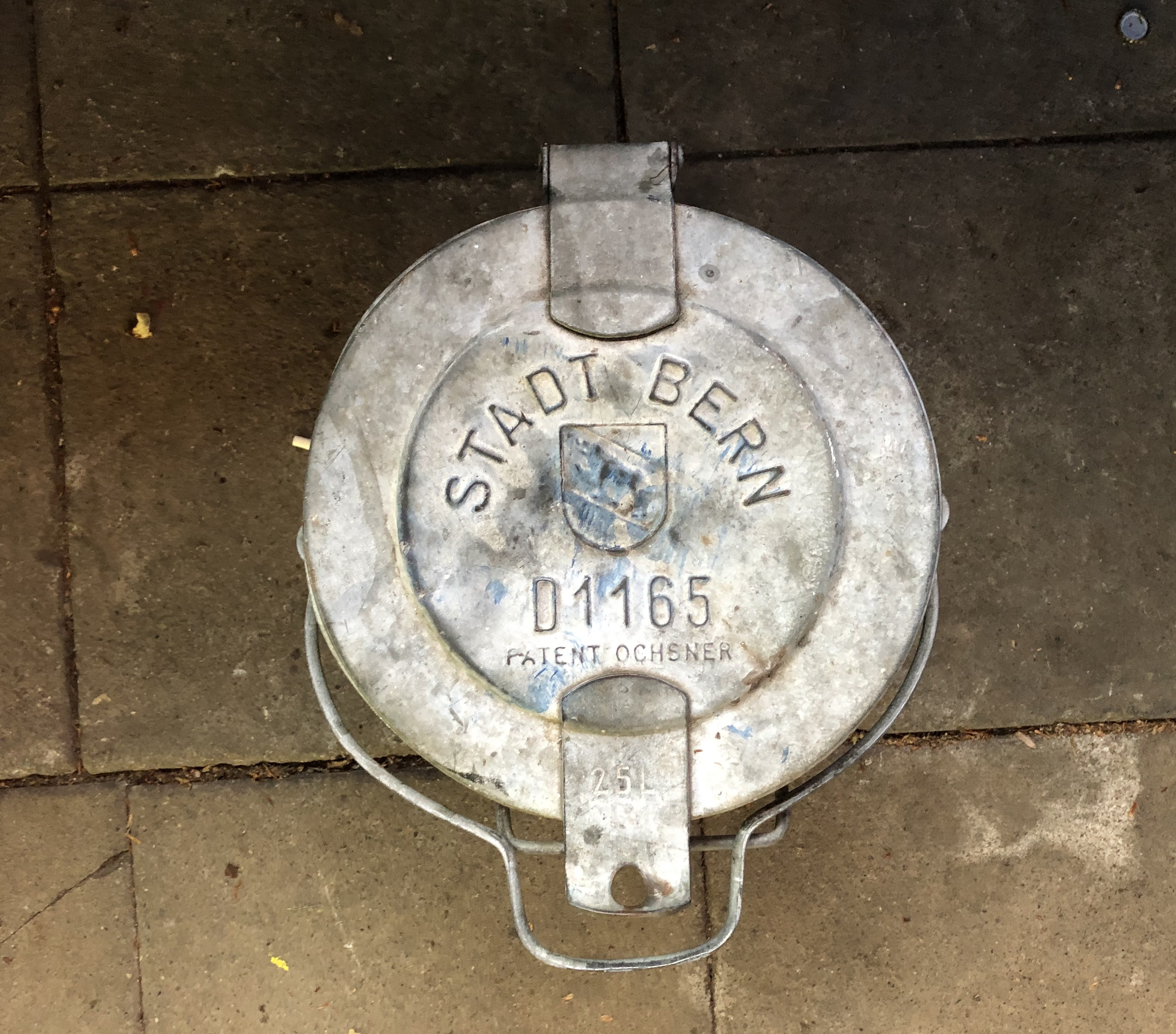 Berne Abfalleimer, Patent Ochsner